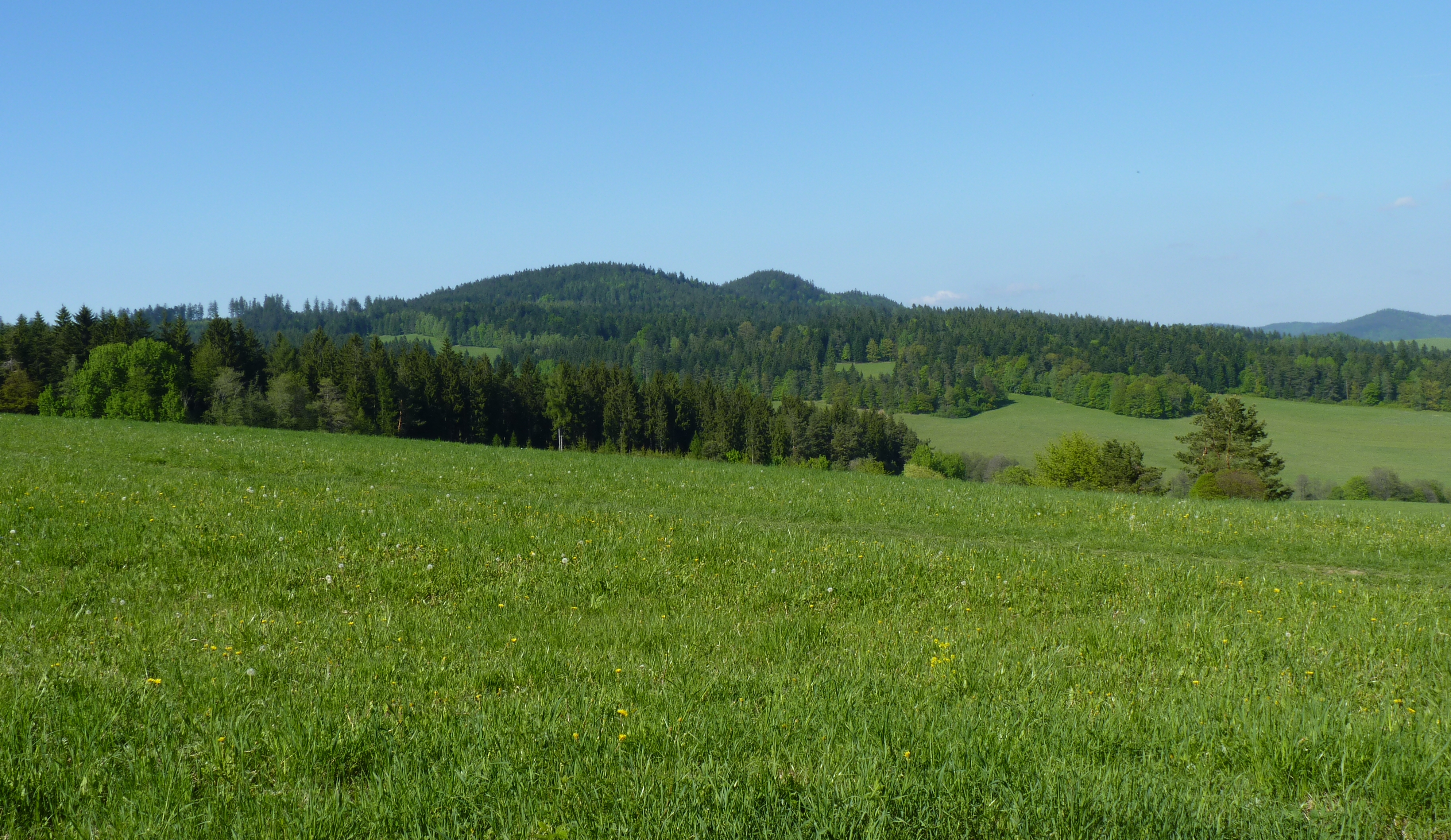 Přírodní park Vizovické vrchy, okres Vsetín, Zlínský kraj